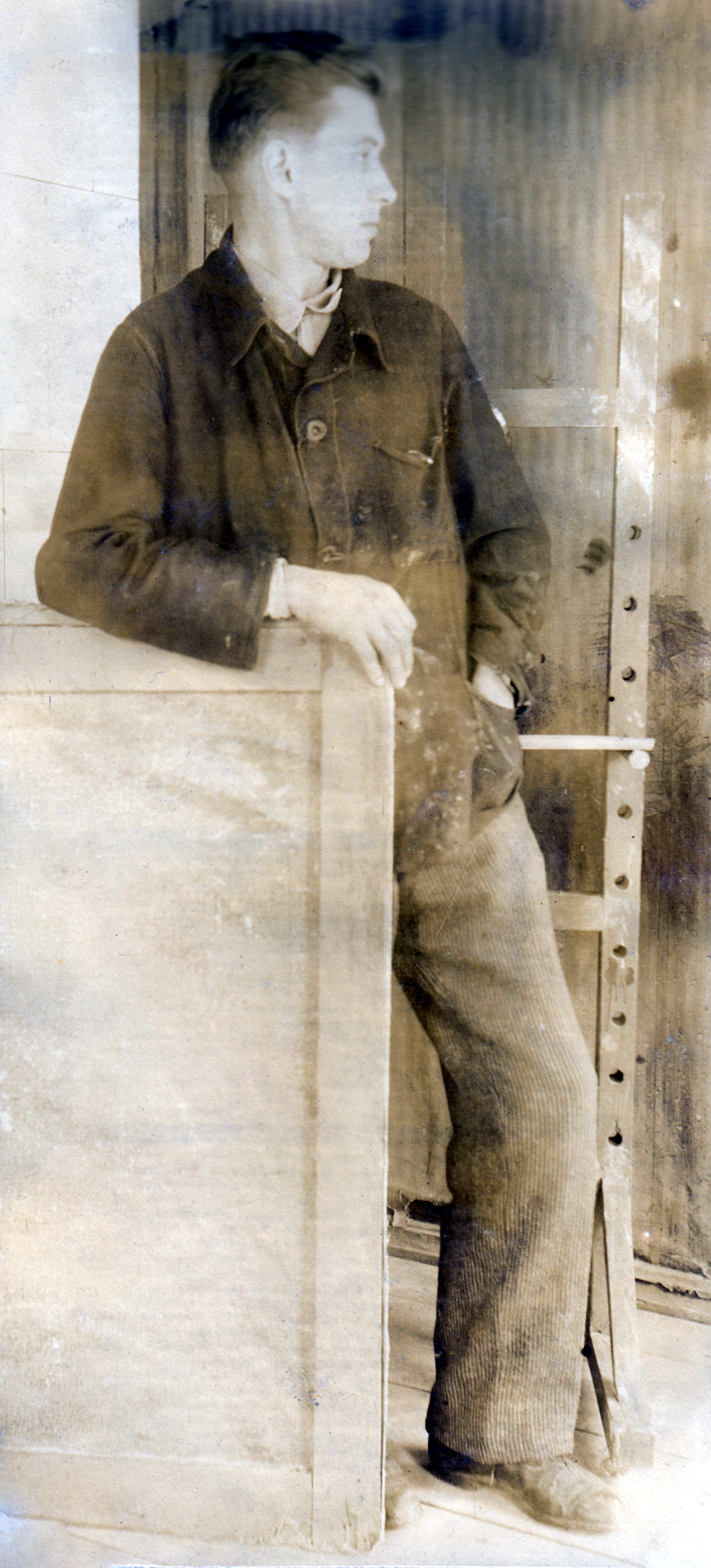 C. И. Маркин в мастерской